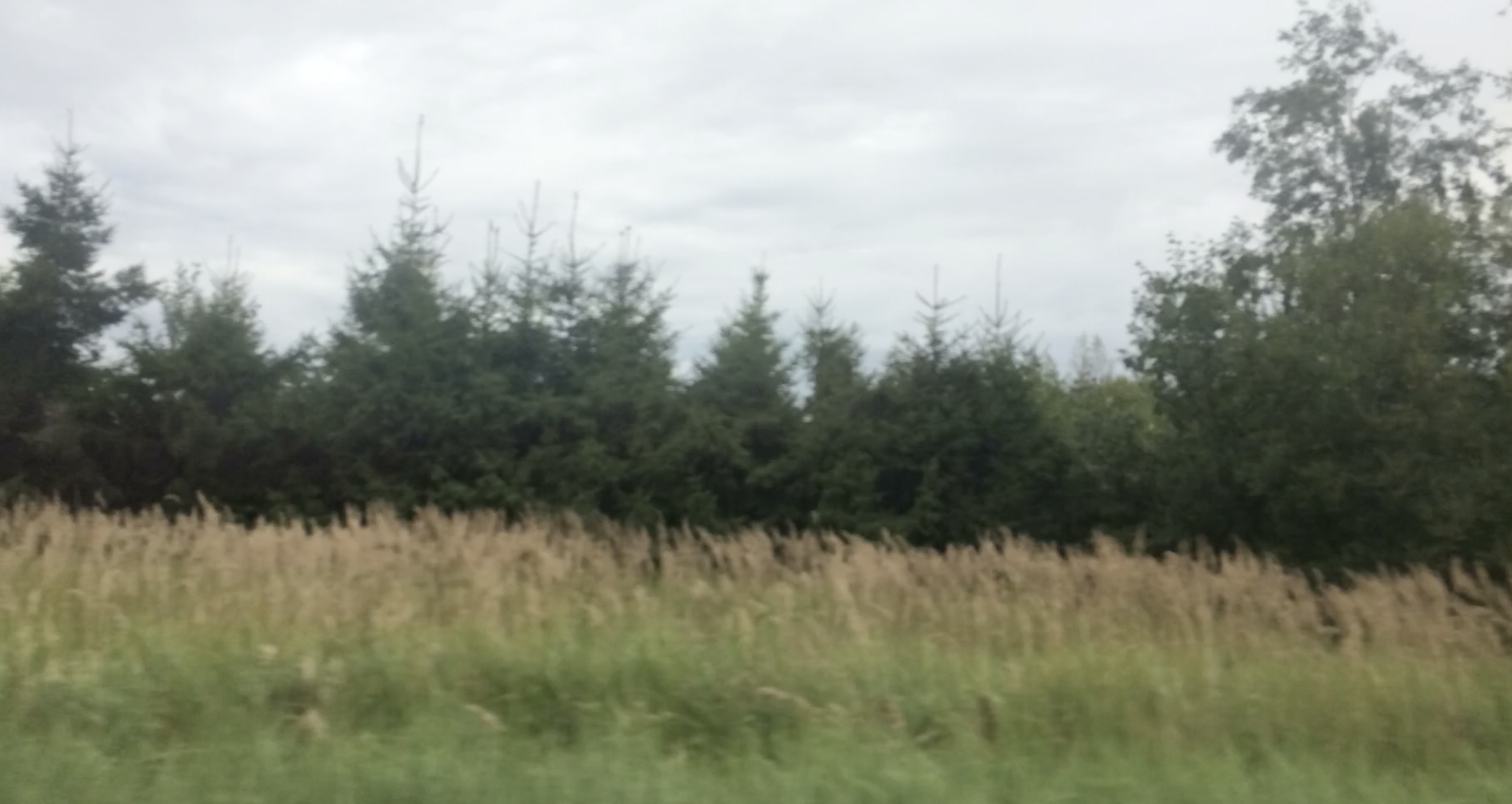 Бавлский край